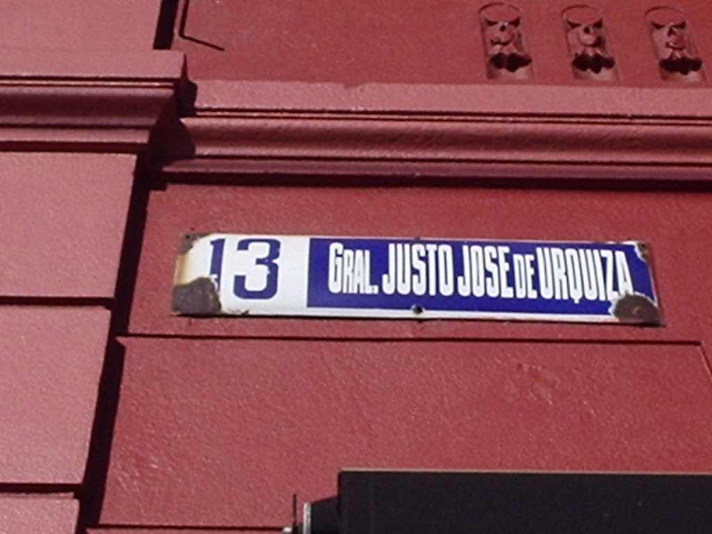 Nomenclatura de Av 13 en La Plata